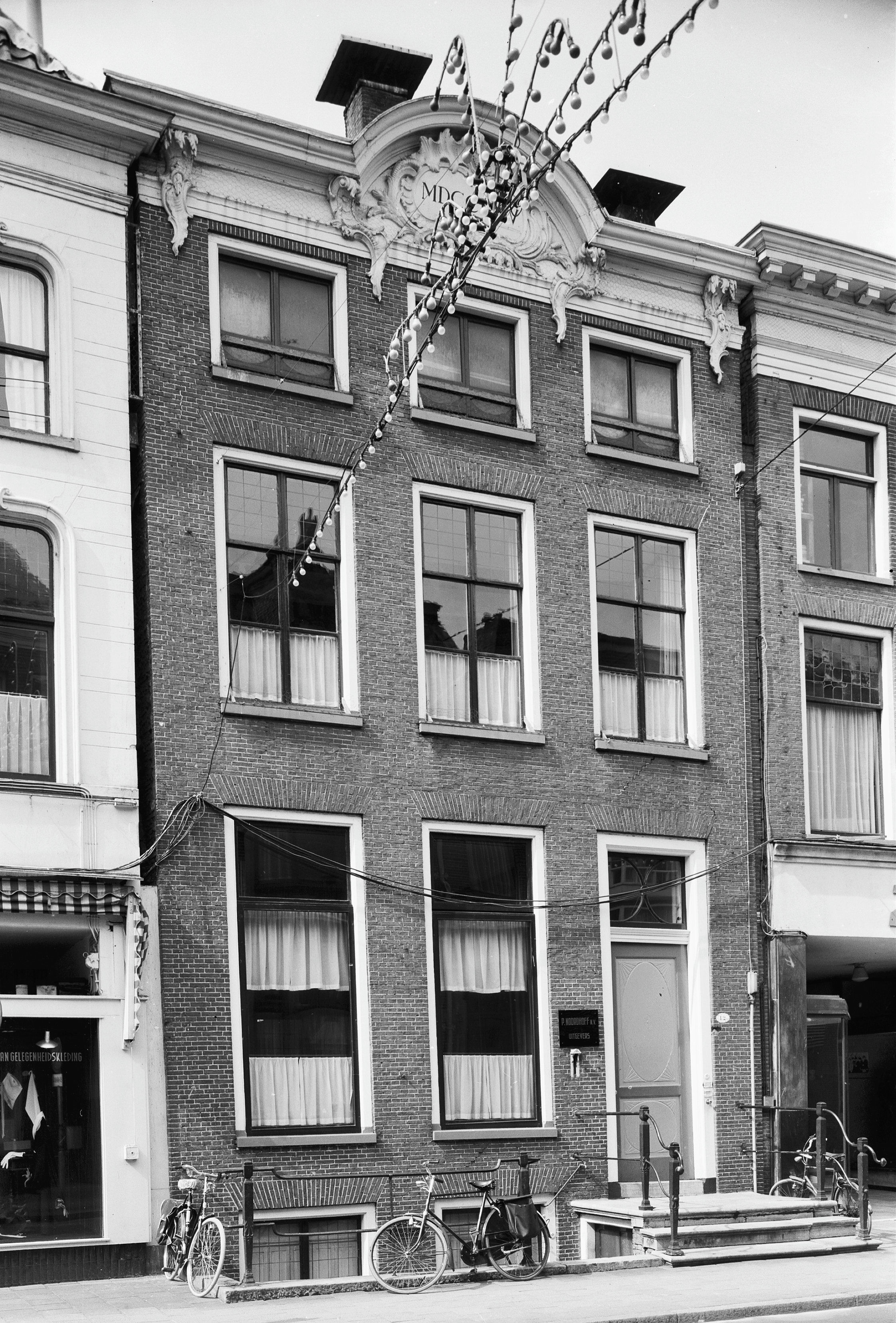 Oude Boteringestraat 12, Groningen, voorgevel, 1965